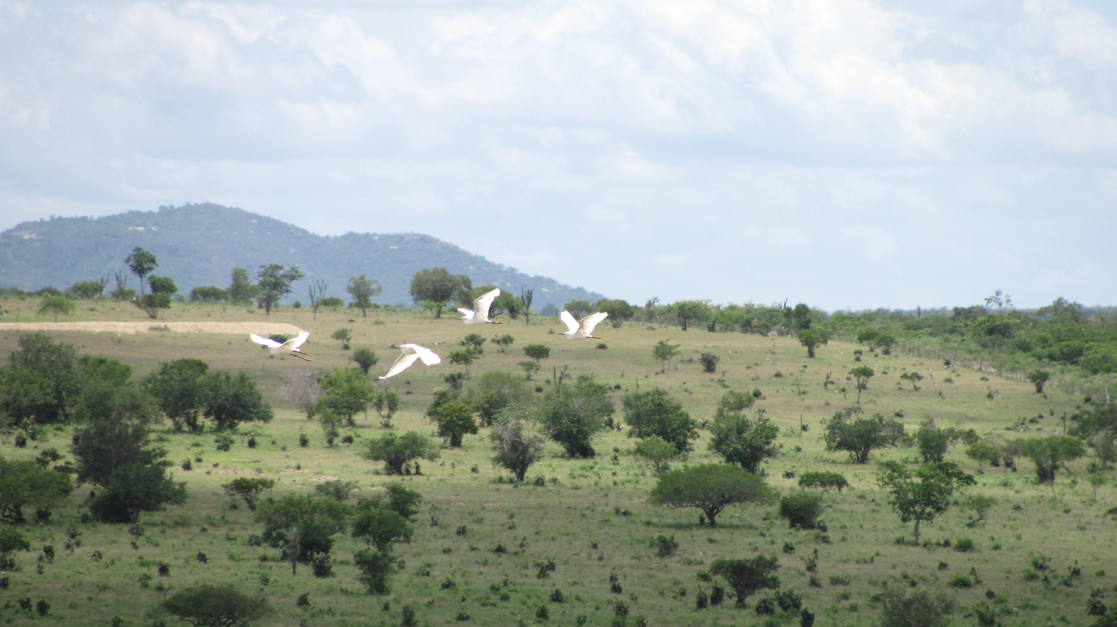 Barragem do Poço Grande , garças sobrevoando o ceu sob a barragem